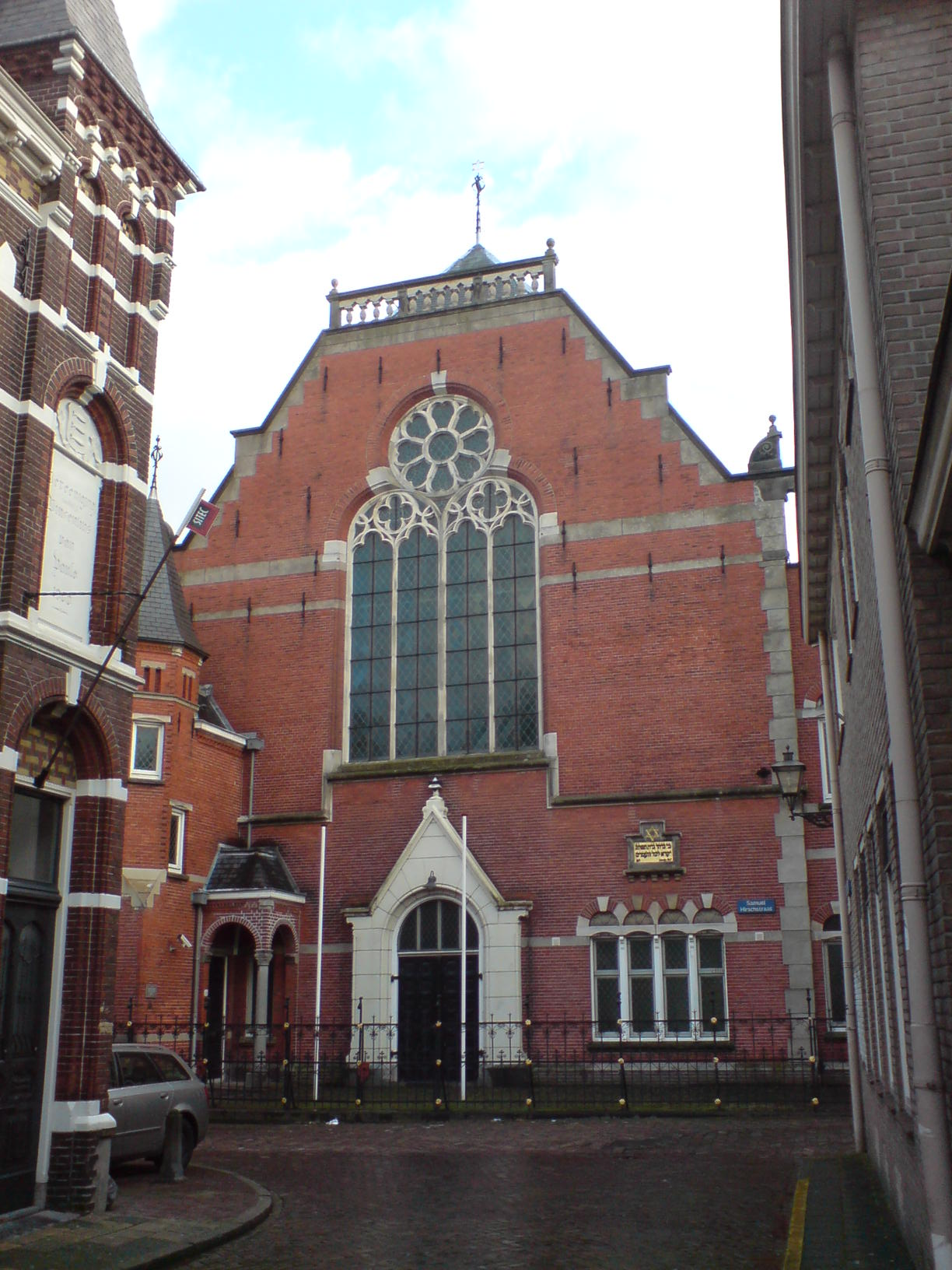 Voorgevel van de synagoge te Zwolle.